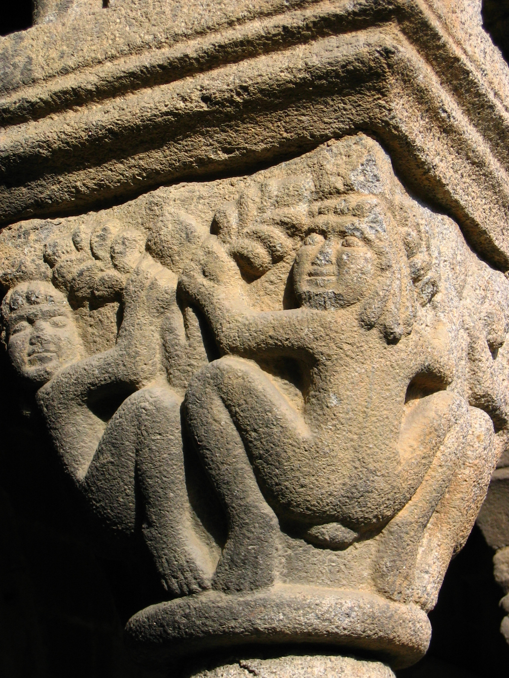 Capitell del Claustre de la Catedral d'Urgell